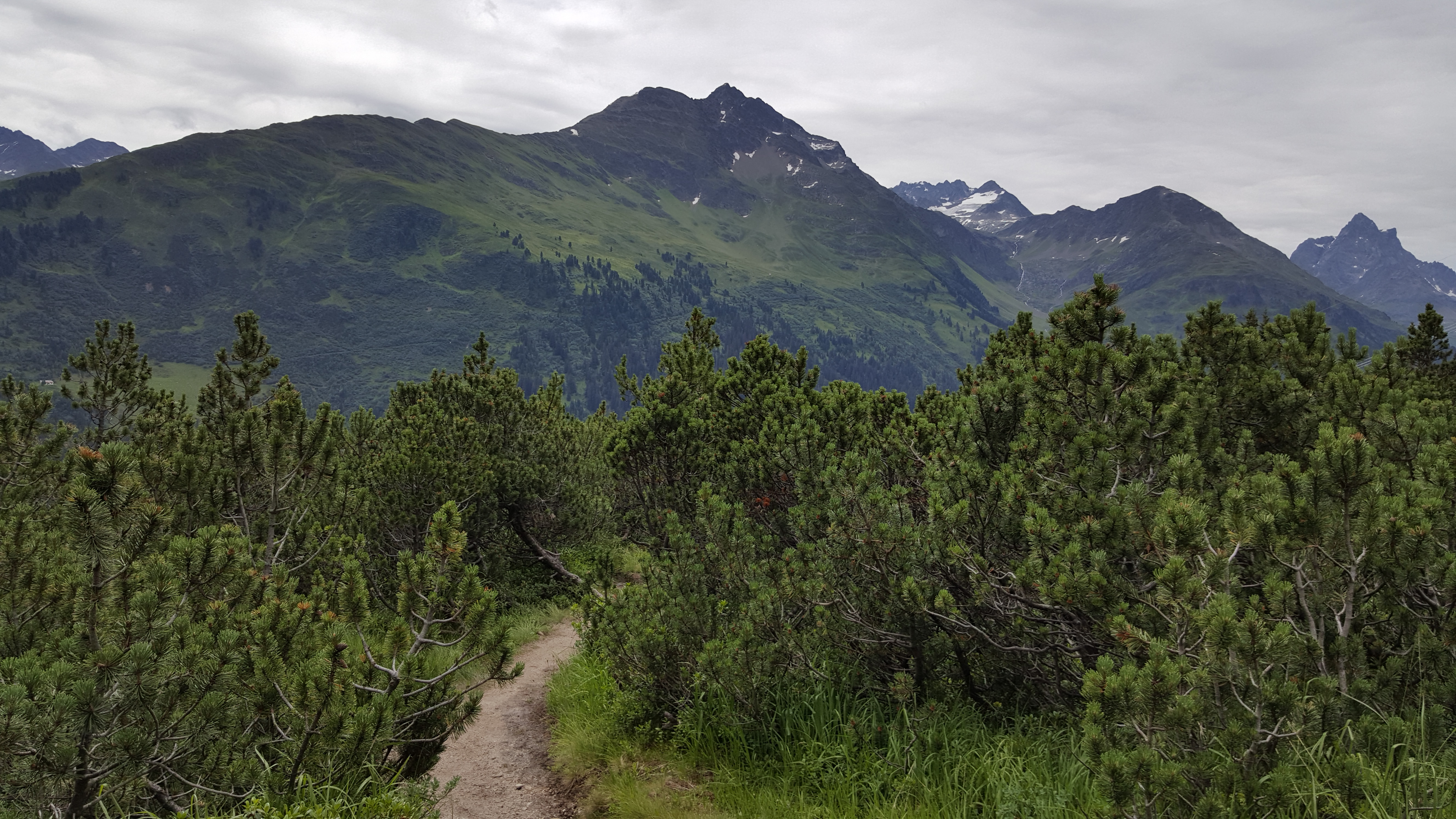 Sankt Anton am Arlberg Bergkiefern Pinus mugo umgangssprachlich Arlen an Senns Wunderwanderweg